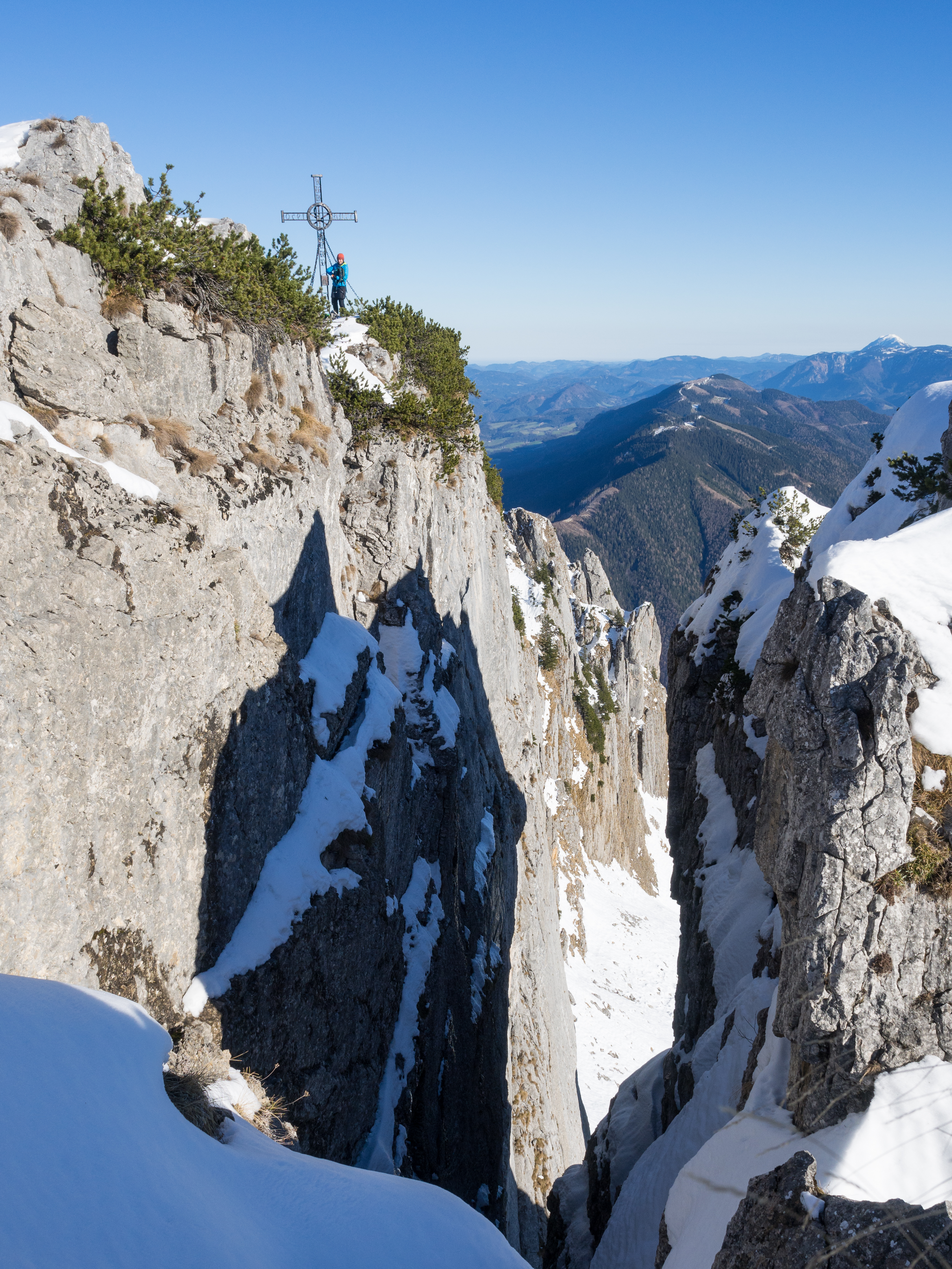 Blick von der Stumpfmauer über den Königsberg hinweg in Richtung Ötscher. Die Felsen sind steilgestellte rhätische Plattenkalke.